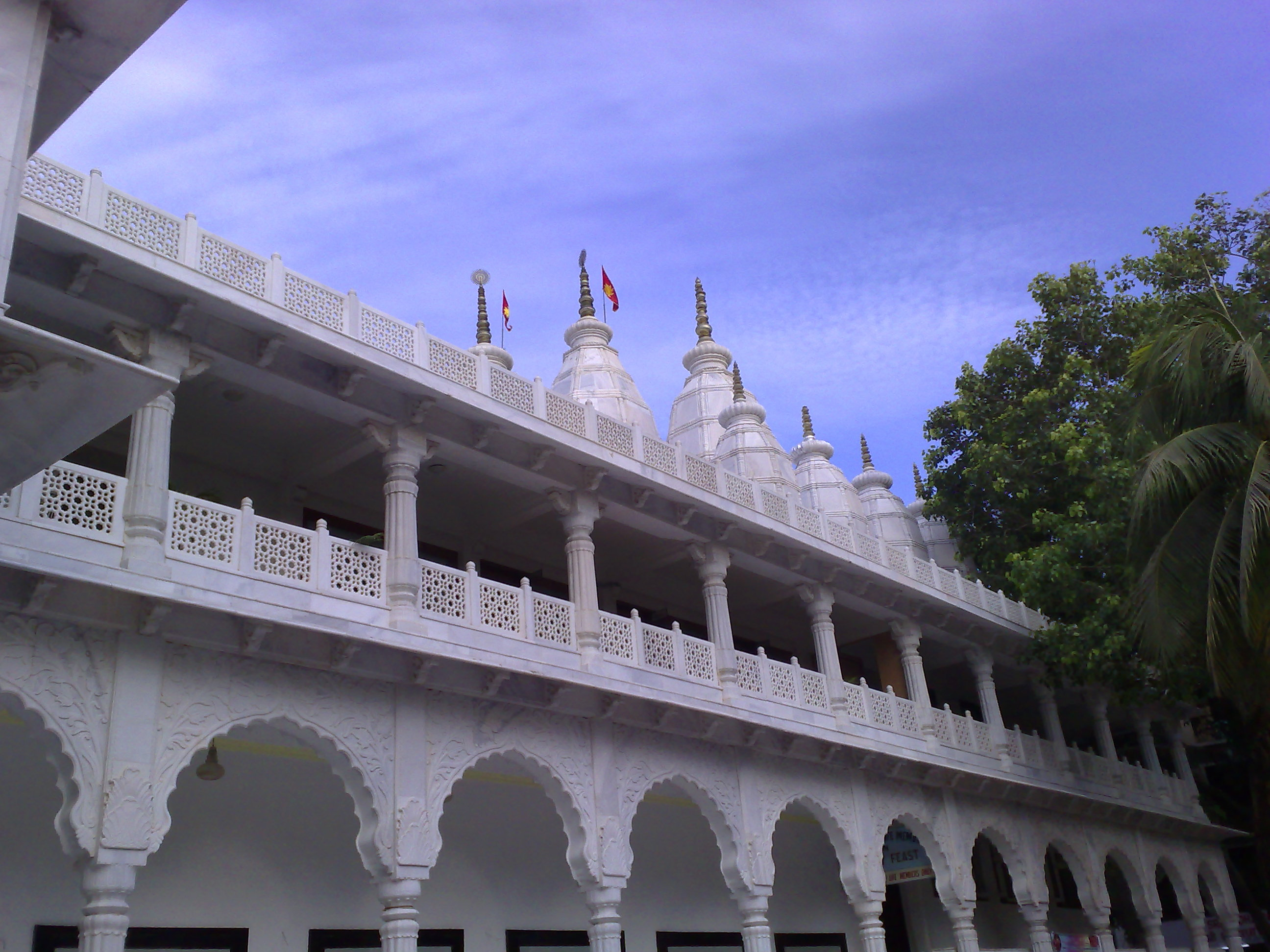 ISKCON Temple, Juhu, Mumbai